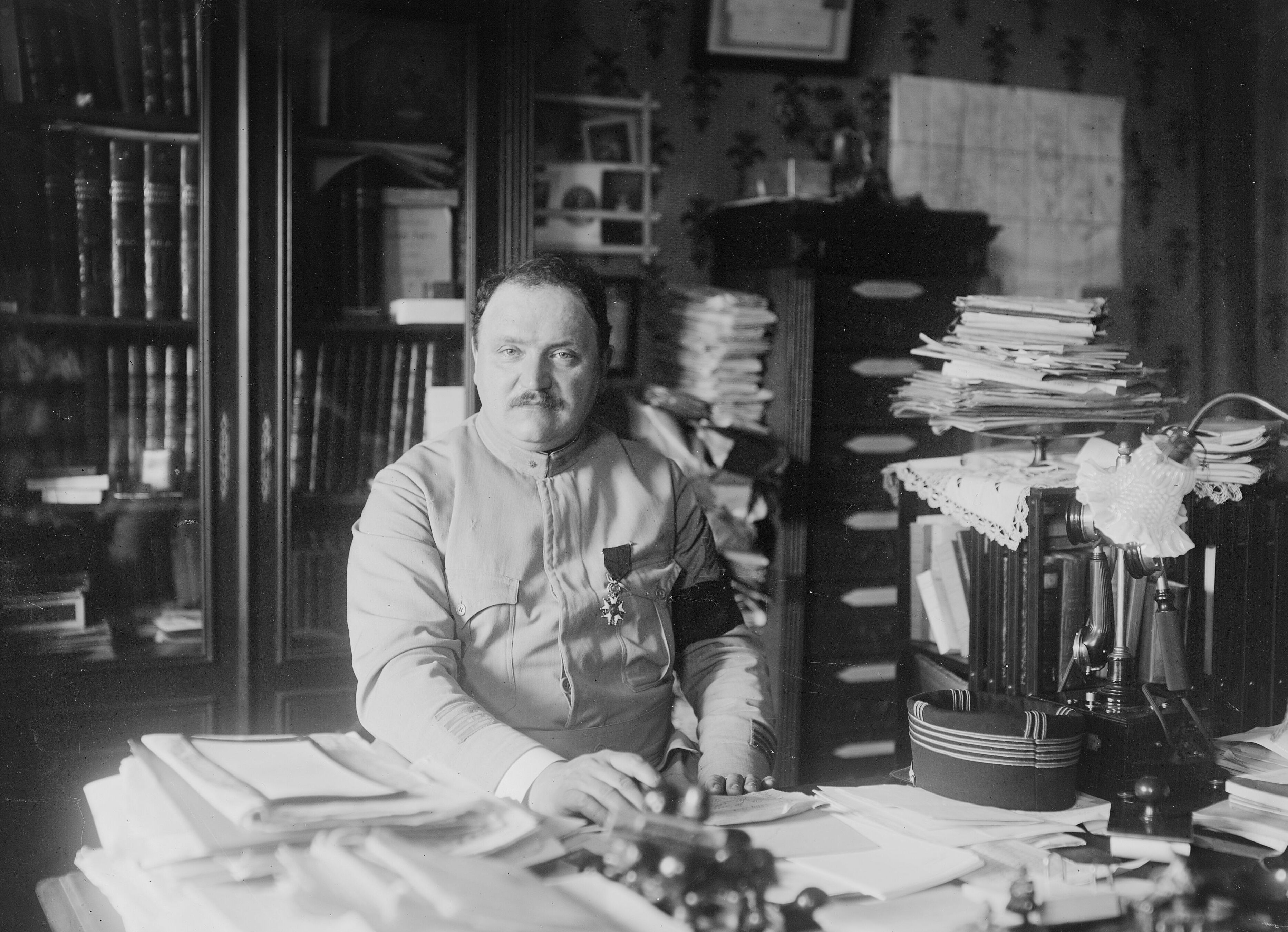 Commandant [Constant] Verlot [créateur et directeur du Centre de rééducation des blessés et mutilés de guerre de Grignon venant d'être décoré de l'Ordre de la Légion d'honneur. Bibliothèque nationale de France, département Estampes et photographie